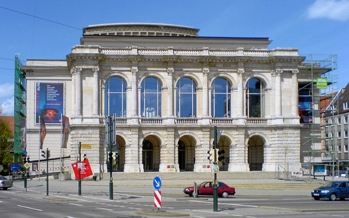 Das Augsburger Stadttheater